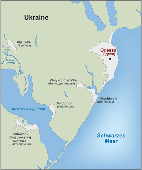 Karte Odessa und Umgebung in der Ukraine